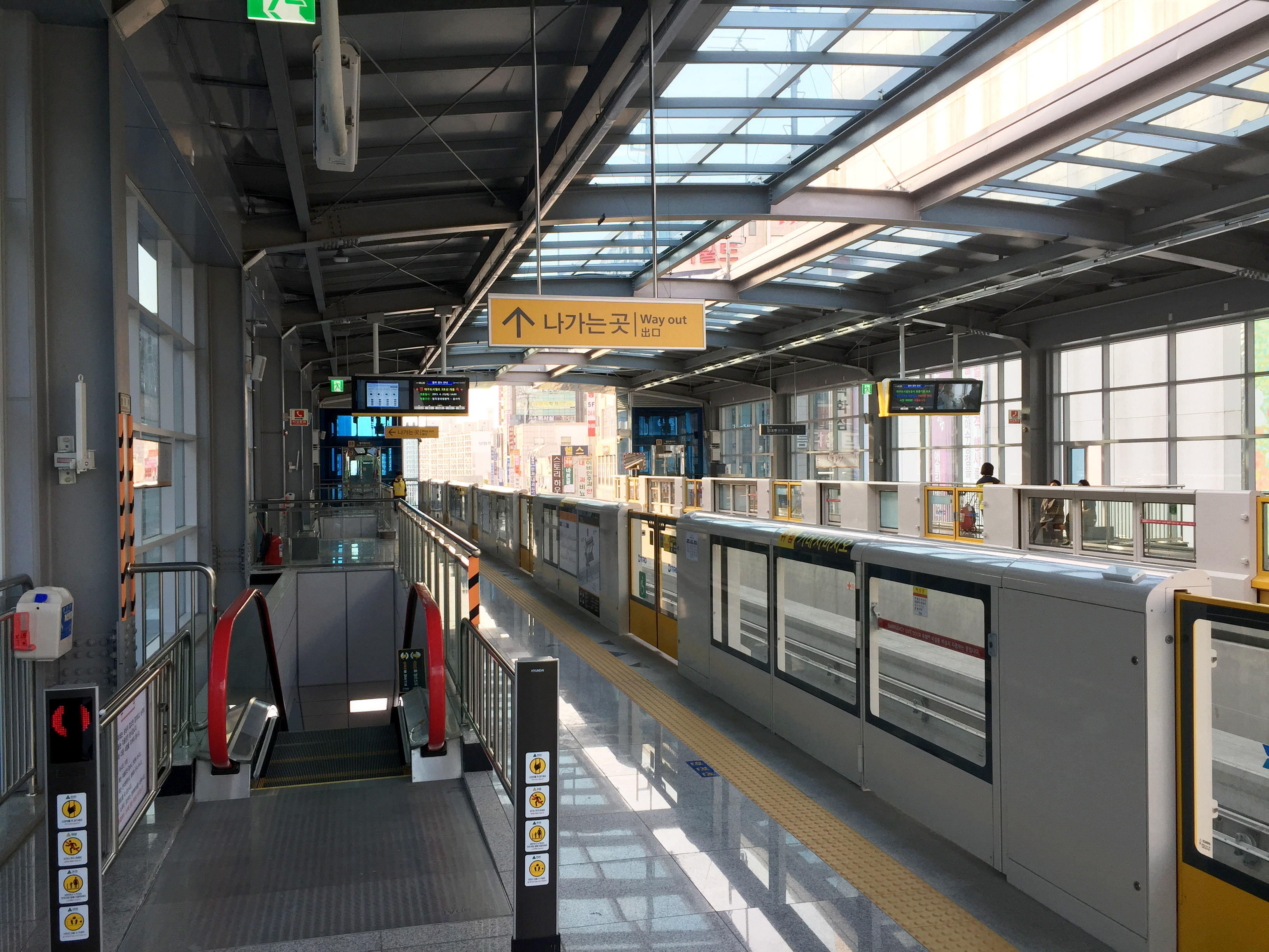 범물역 승강장